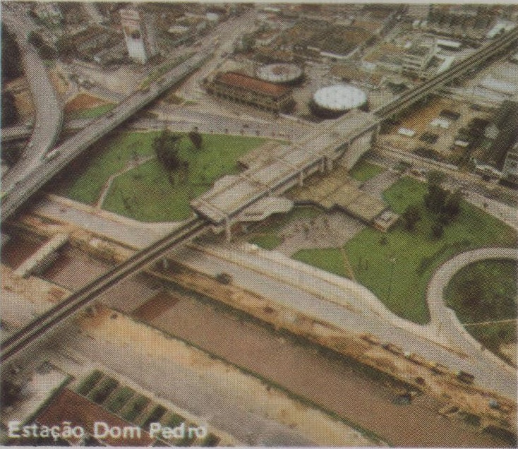 Vista aérea da estação Pedro II recém inaugurada.